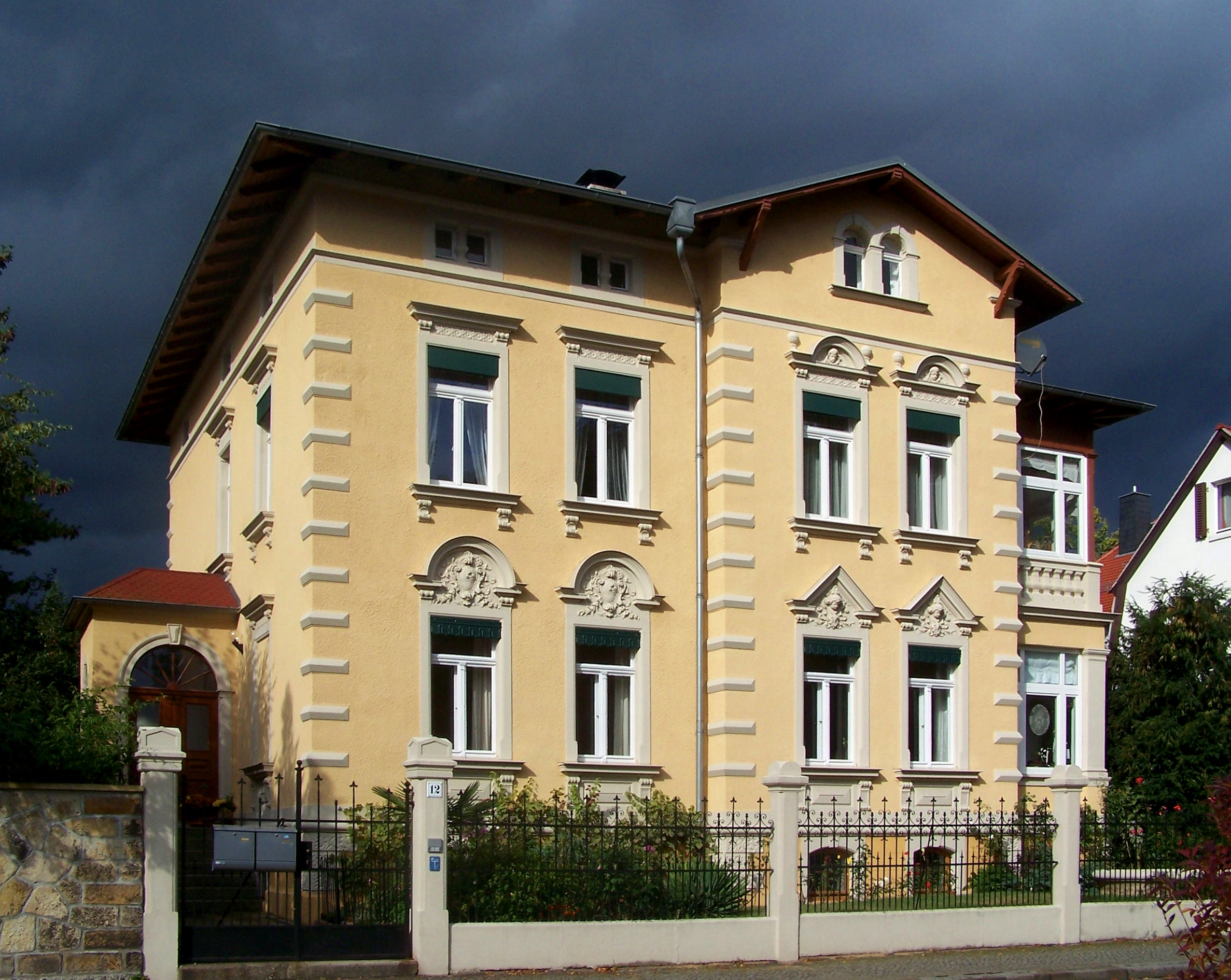 Einsteinstr. 12 in Radebeul